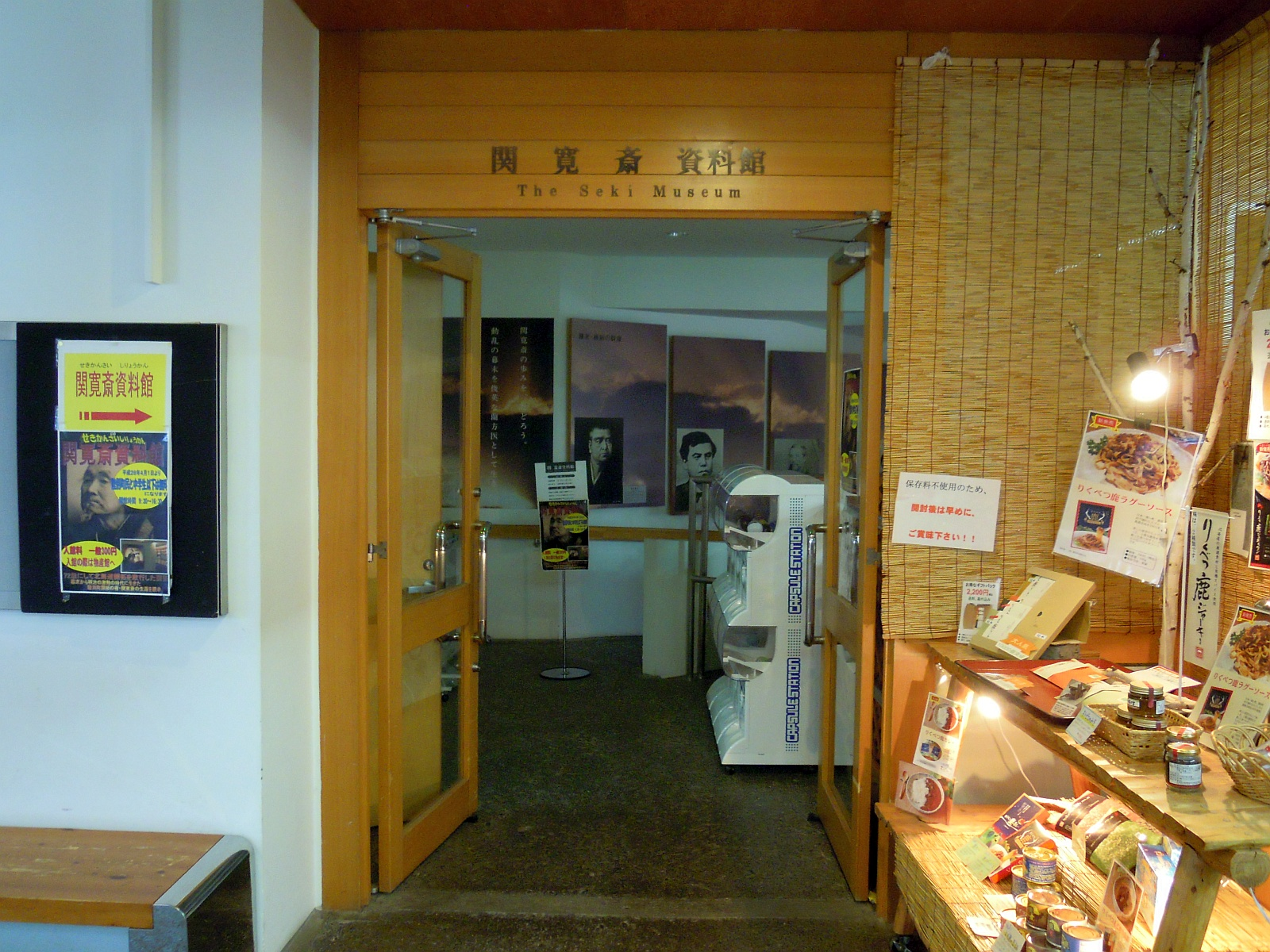 北海道足寄郡陸別町の道の駅オーロラタウン93りくべつ内にある関寛斎資料館入口。